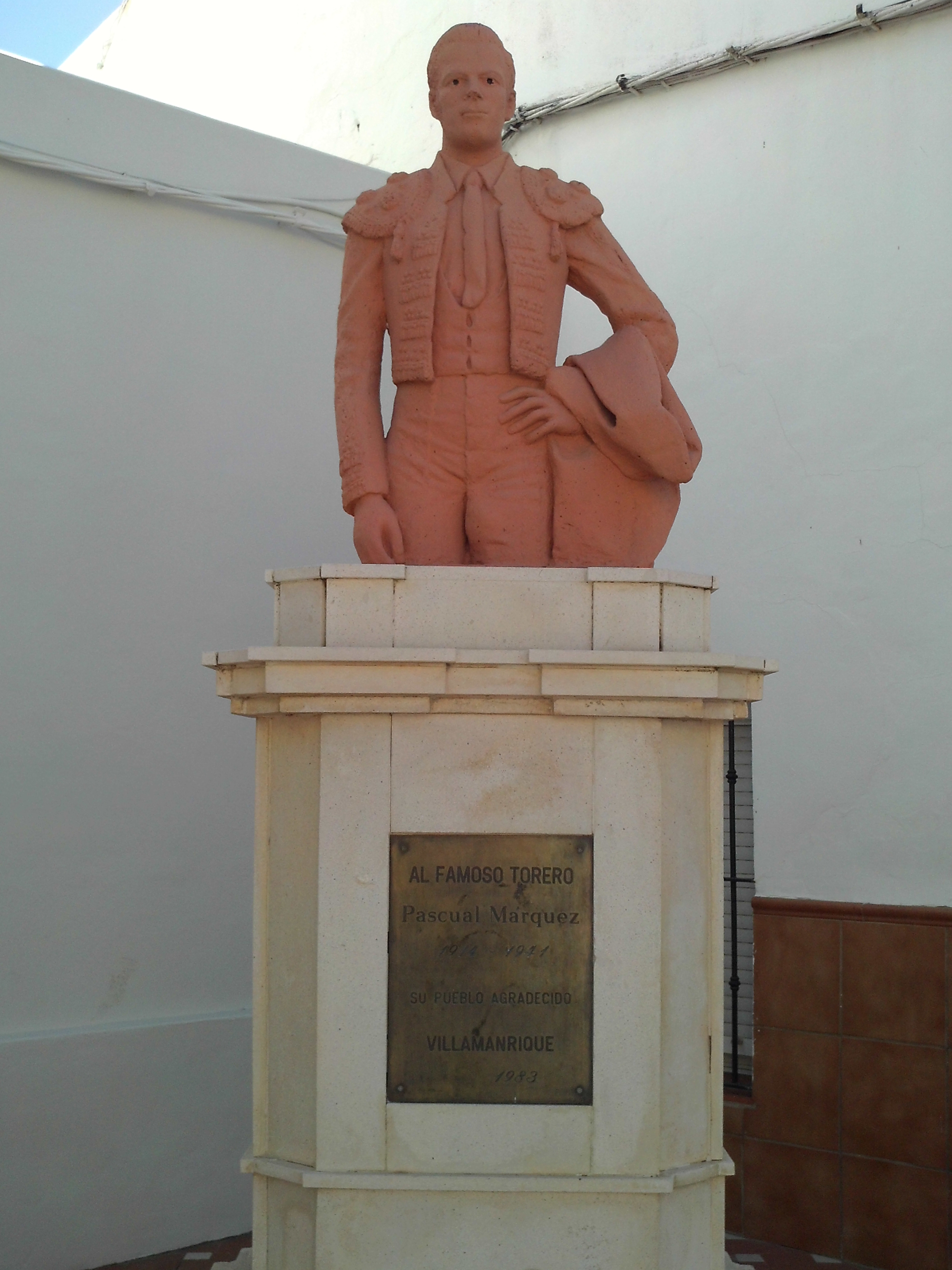 Monumento al torero Pascual Márquez (1914-1941) de 1983. Villamanrique de la Condesa, provincia de Sevilla, Andalucía, España.